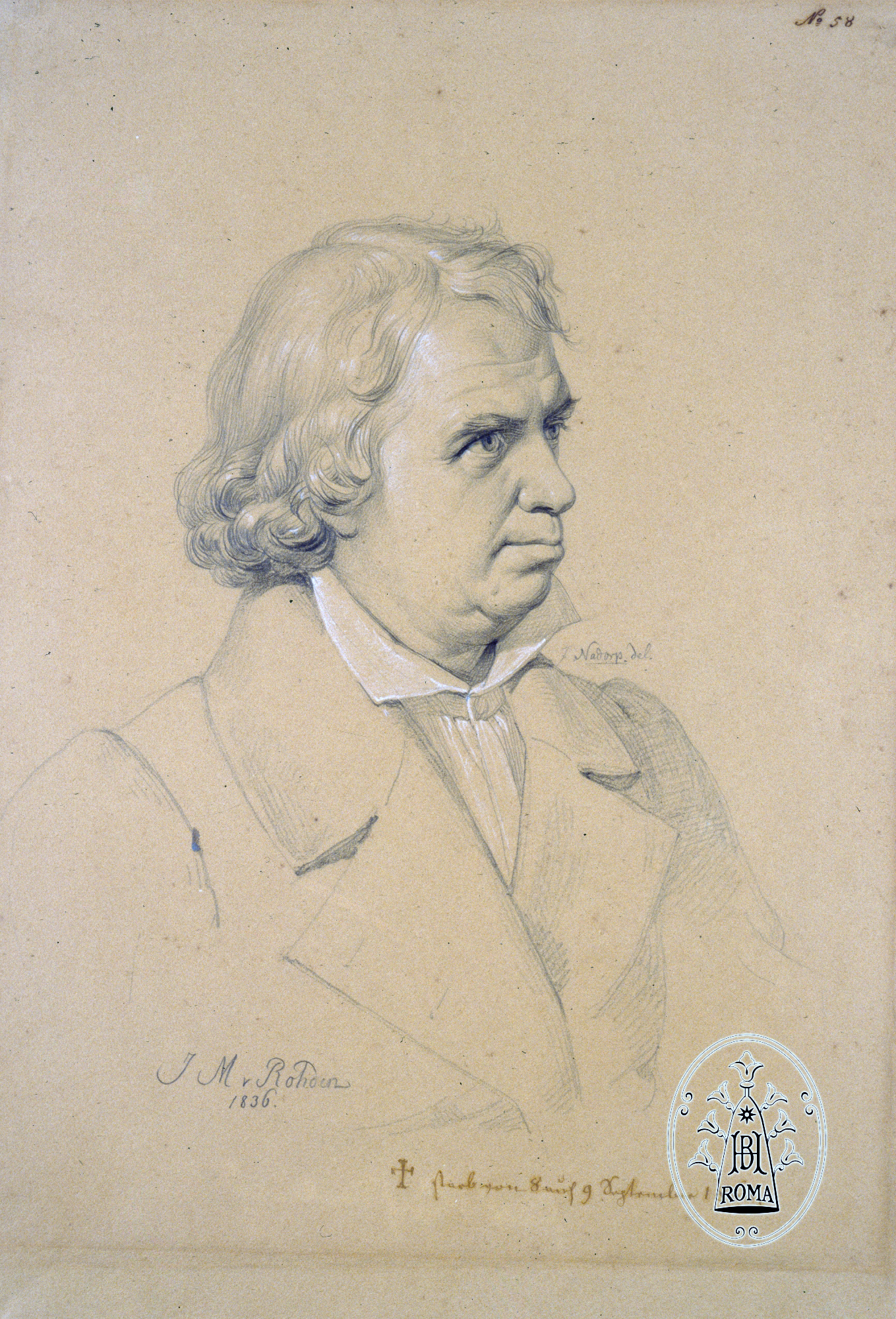 Porträt Johann Martin von Rohden, gezeichnet von Franz Johann Heinrich Nadorp, Rom 1836